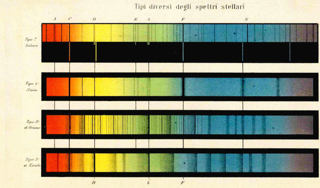 La prima classificazione spettrale delle stelle fatta da Angelo Secchi nel 1866. Tavola pubblicata nel 1878 nel volume : Le Stelle